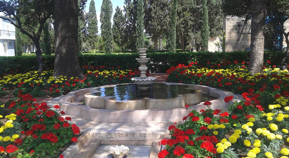 Ridvan lorategiko iturri nagusia, bahá'íen toki sakratua. Israel.